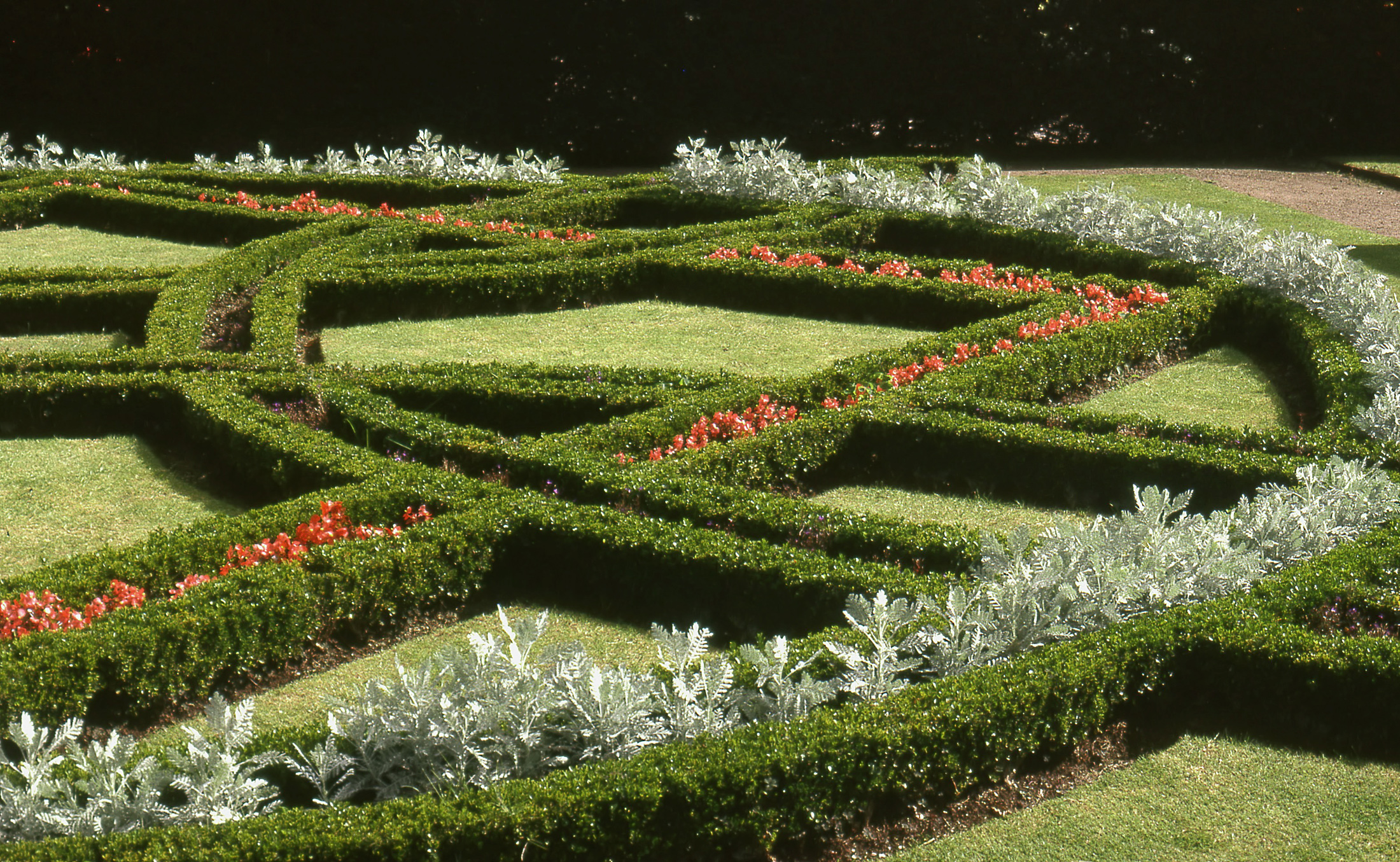 Knotenbeet in St Fagans museum of country life, Wales